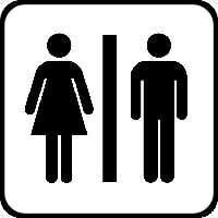 AIGA符号中厕所的象形符号（公有领域）